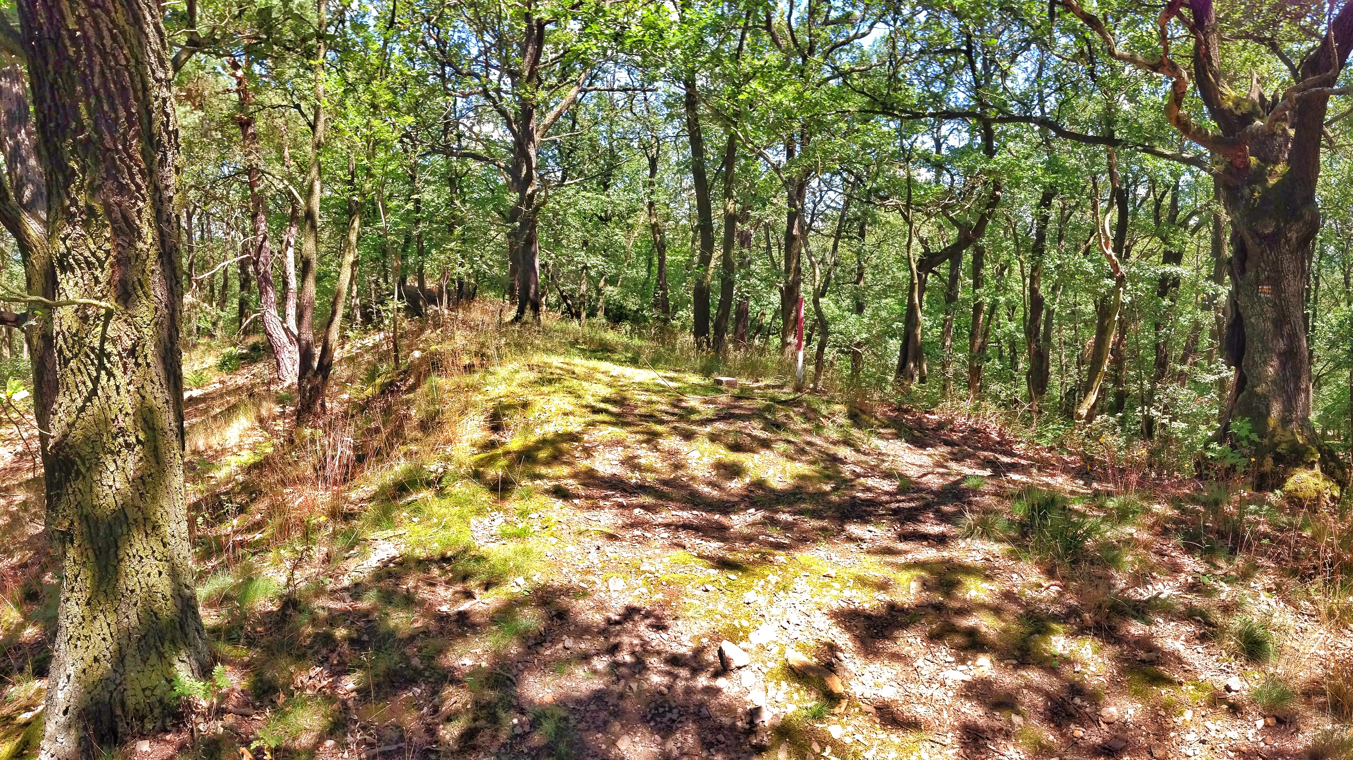 Vrchol Zámeckého vrchu v Křivoklátské vrchovině